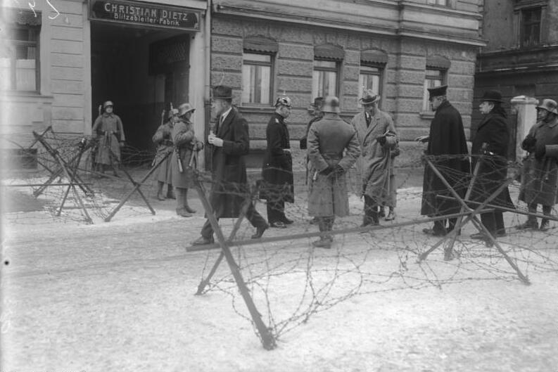 Zu dem Hitler-Ludendorf-Prozess in München. Passkontrolle in der Umgegend der Kriegsschule.